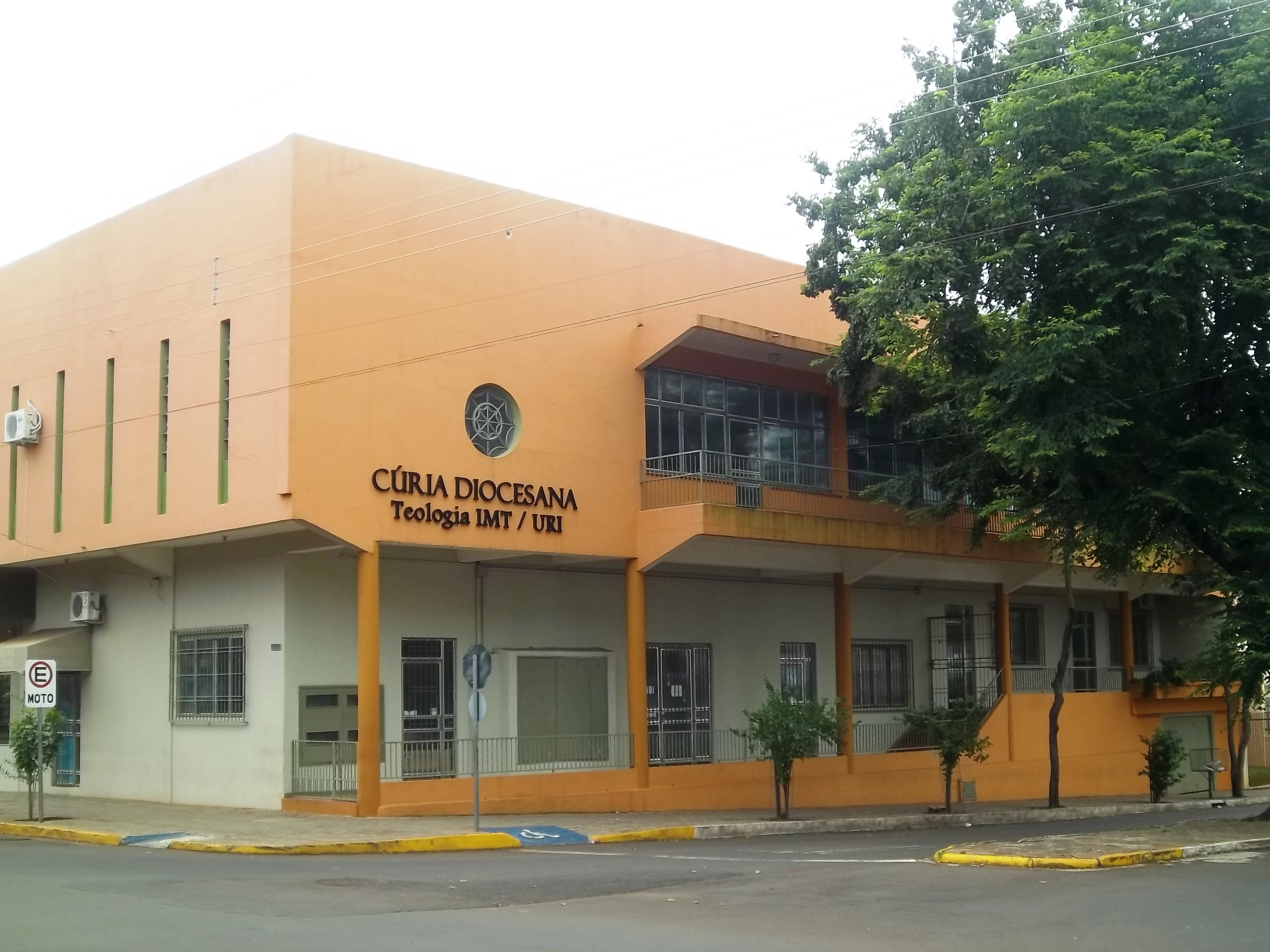 Sede da Cúria Diocesana de Santo Ângelo, Rio Grande do Sul, Brasil.